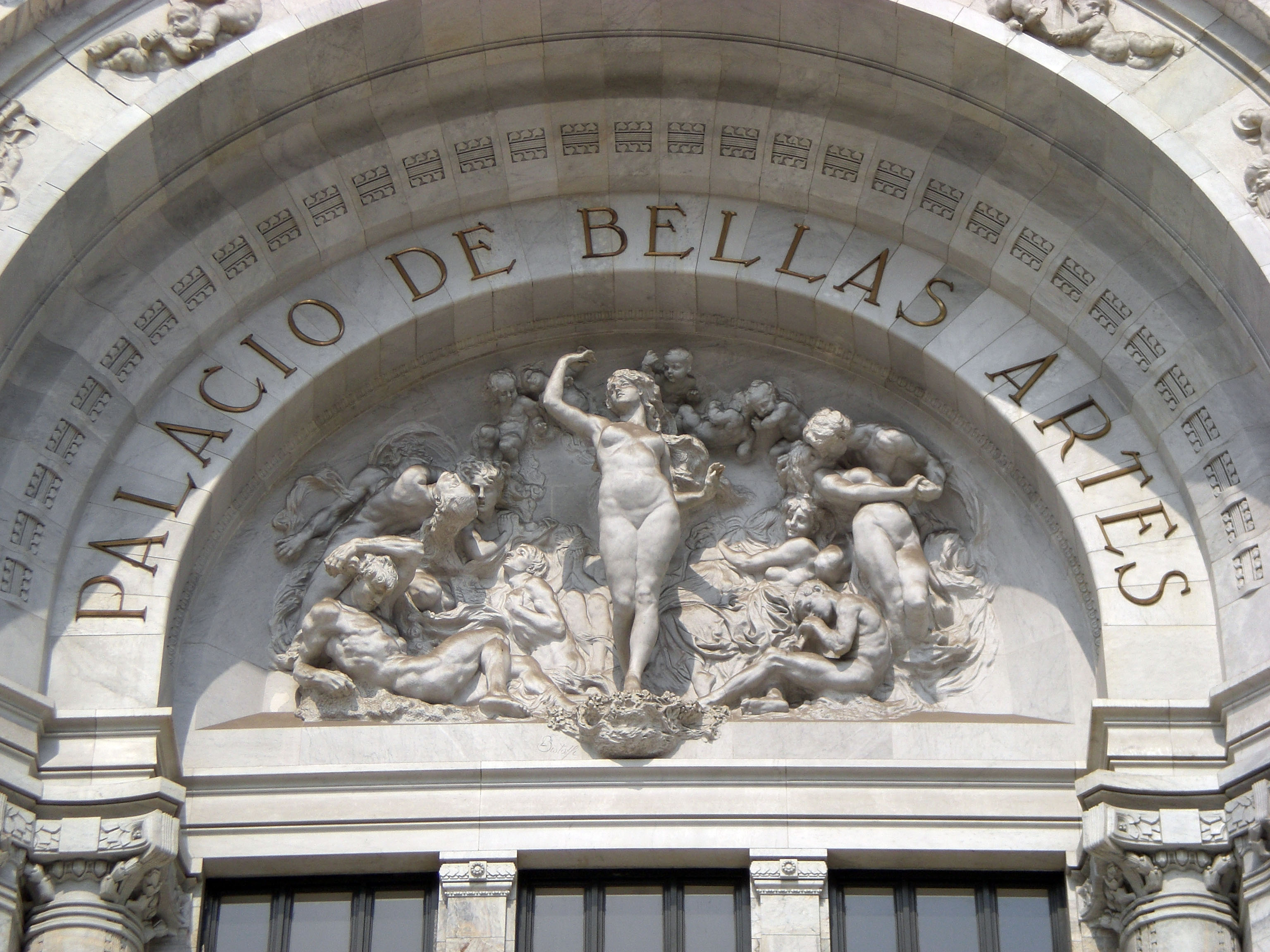 Palacio de Bellas Artes Ciudad de México